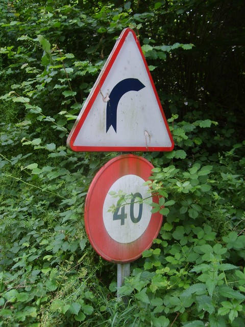 Panneau de danger A1a en acier émaillé